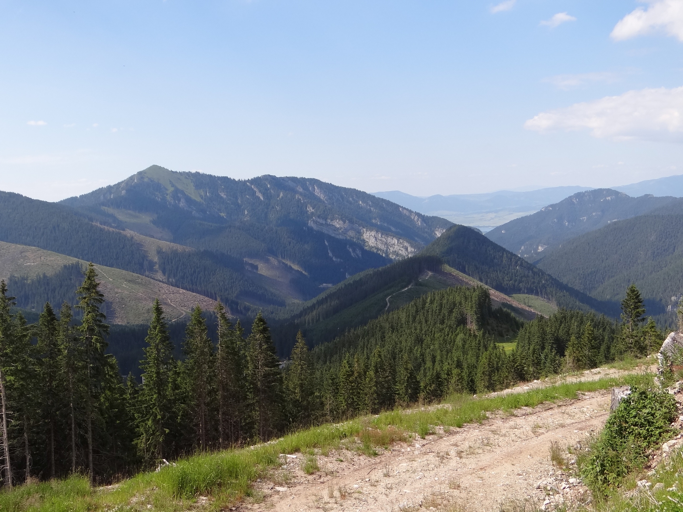 Demänovská dolina: Ostredok, Siná